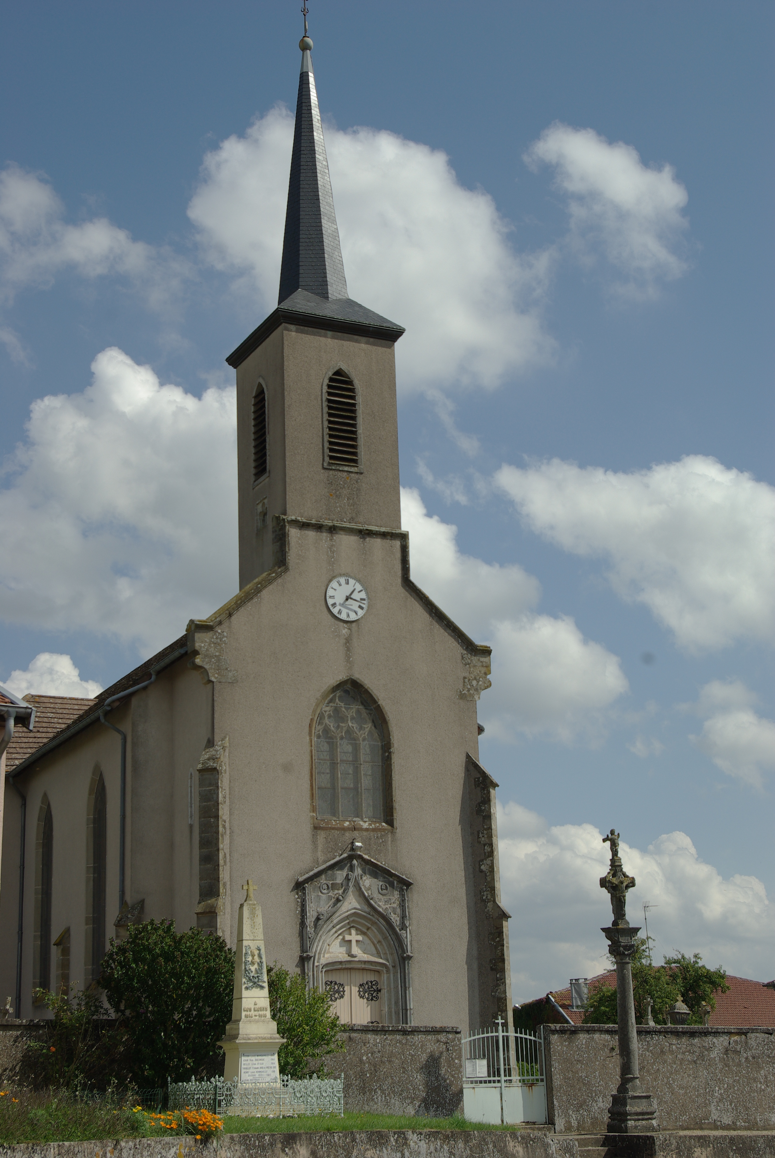 Église de Biécourt (88)